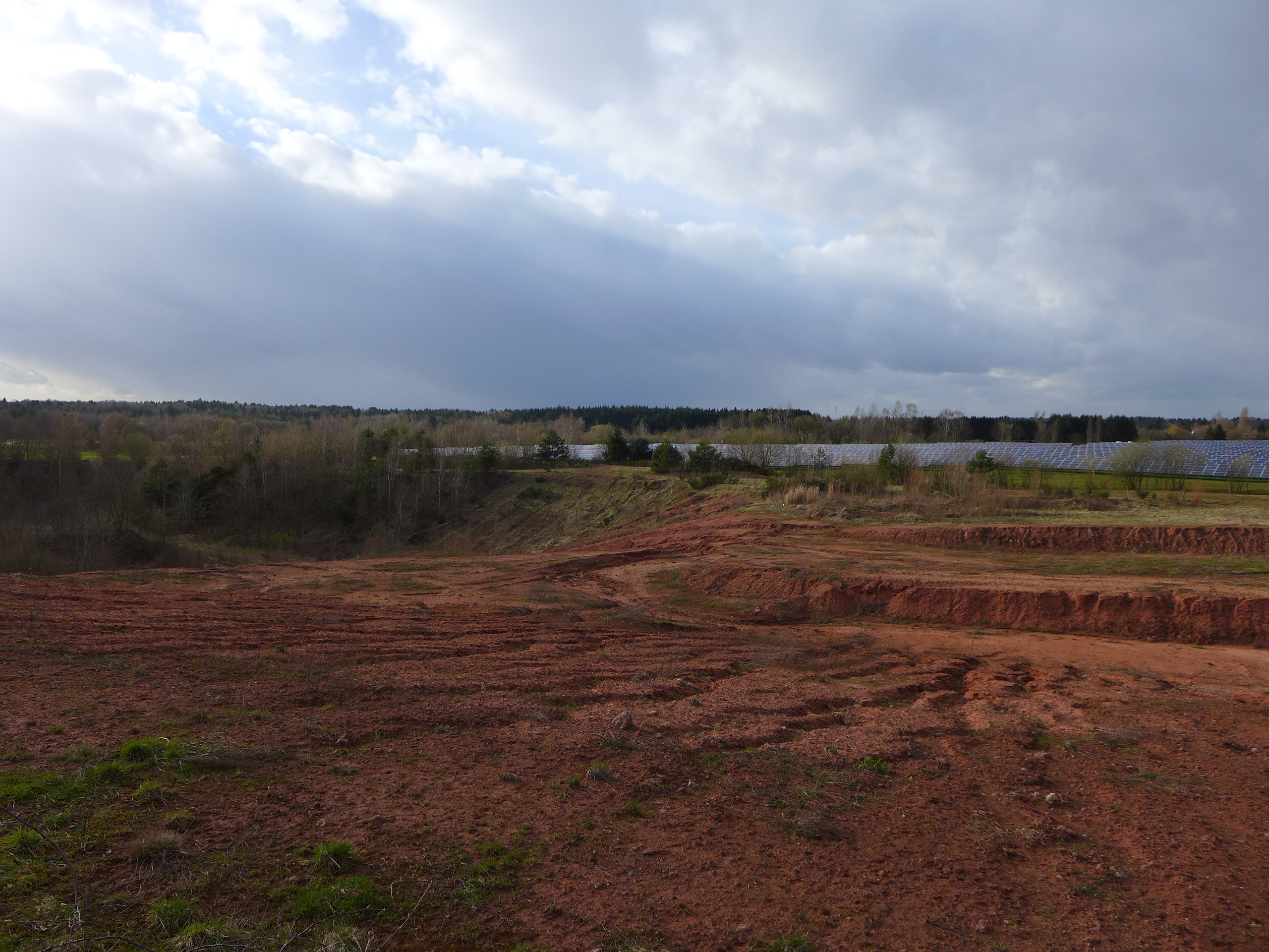 Diefflen, Kiesabbaugebiet auf der Hochfläche, im Hintergrund Nutzung des ehemaligen Abbaugebietes durch Photovoltaik